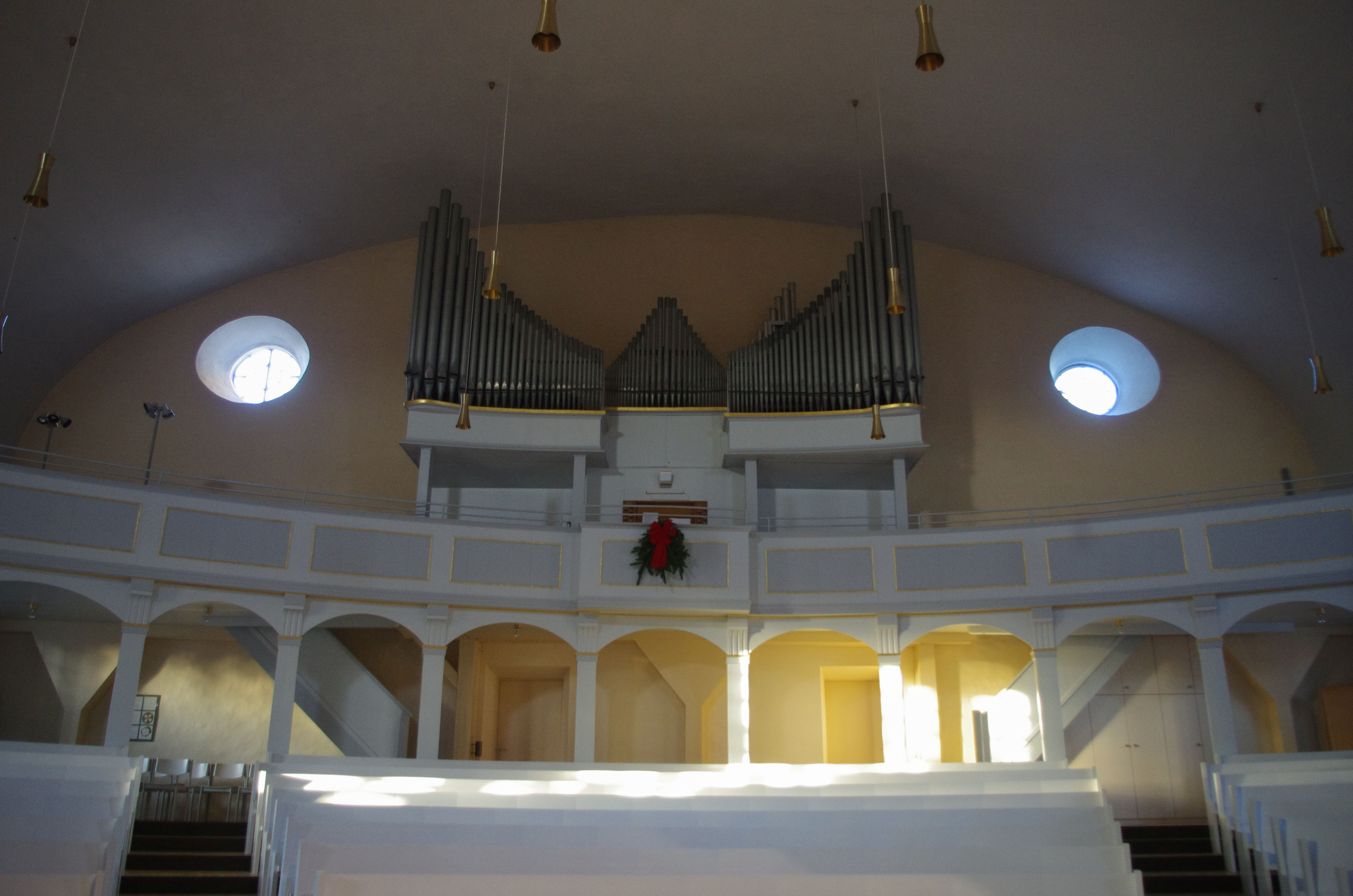 Pattensen in Niedersachsen. Das Bild zeigt Detail der evangelischen Kirch St. Lukas in Pattensen. Die Kirche ist als Denkmal geschützt.